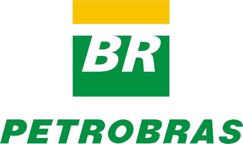 Logomarca da Petrobras.